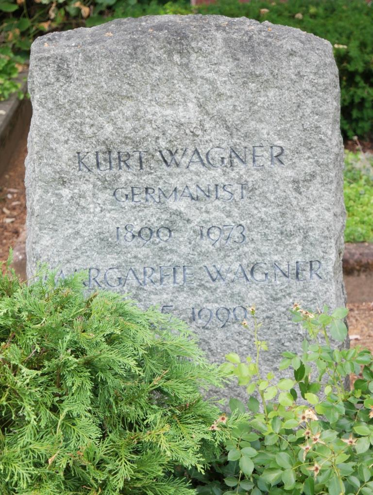 Grab des Germanisten und Volkskundlers Kurt Wagner, 1890-1973, auf dem Hauptfriedhof Mainz